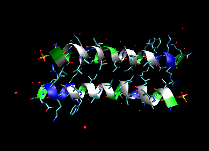 Struktur von Mellitin. Selbst mit VMD/povray erstellt